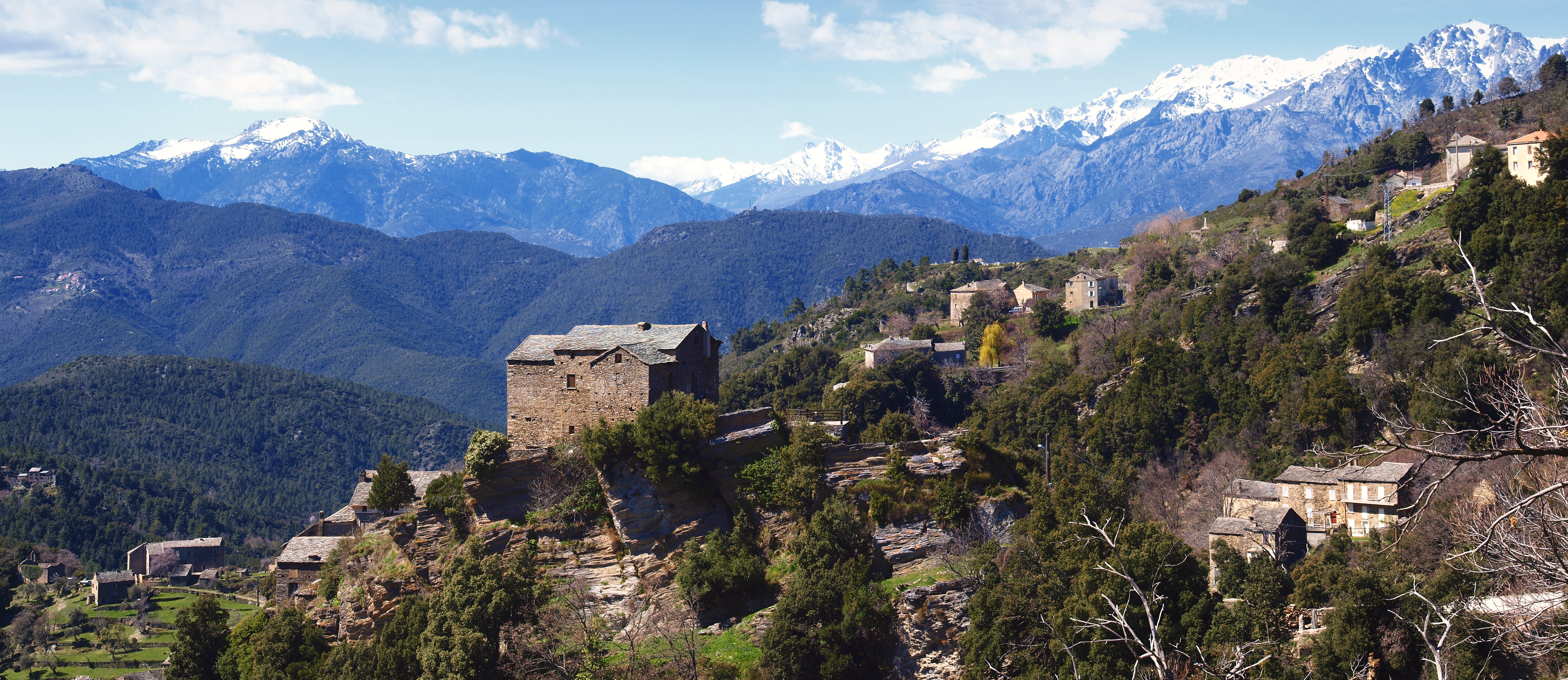 Morosaglia (Corsica) - Panorama sur la Maison de l'Alpa à Terchini